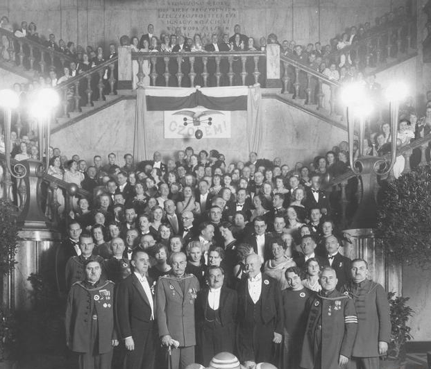 Fotografia grupowa uczestników balu na schodach westybulu Sejmu Śląskiego. W pierwszym rzędzie od lewej widoczni m.in.: prezydent Królewskiej Huty Wincenty Spaltenstern, prezydent Katowic Adam Kocur, prezes Towarzystwa Gimnastycznego "Sokół" hr. Adam Zmoyski, marszałek Sejmu Śląskiego Konstanty Wolny, były prezes Towarzystwa Gimnastycznego "Sokół" dzielnicy śląskiej Józef Dreyza, pani Zofia Kisielewska, prezes Towarzystwa Gimnastycznego "Sokół" dzielnicy śląskiej Tomasz Kowalczyk oraz były skarbnik Towarzystwa Jan Smoczyk.